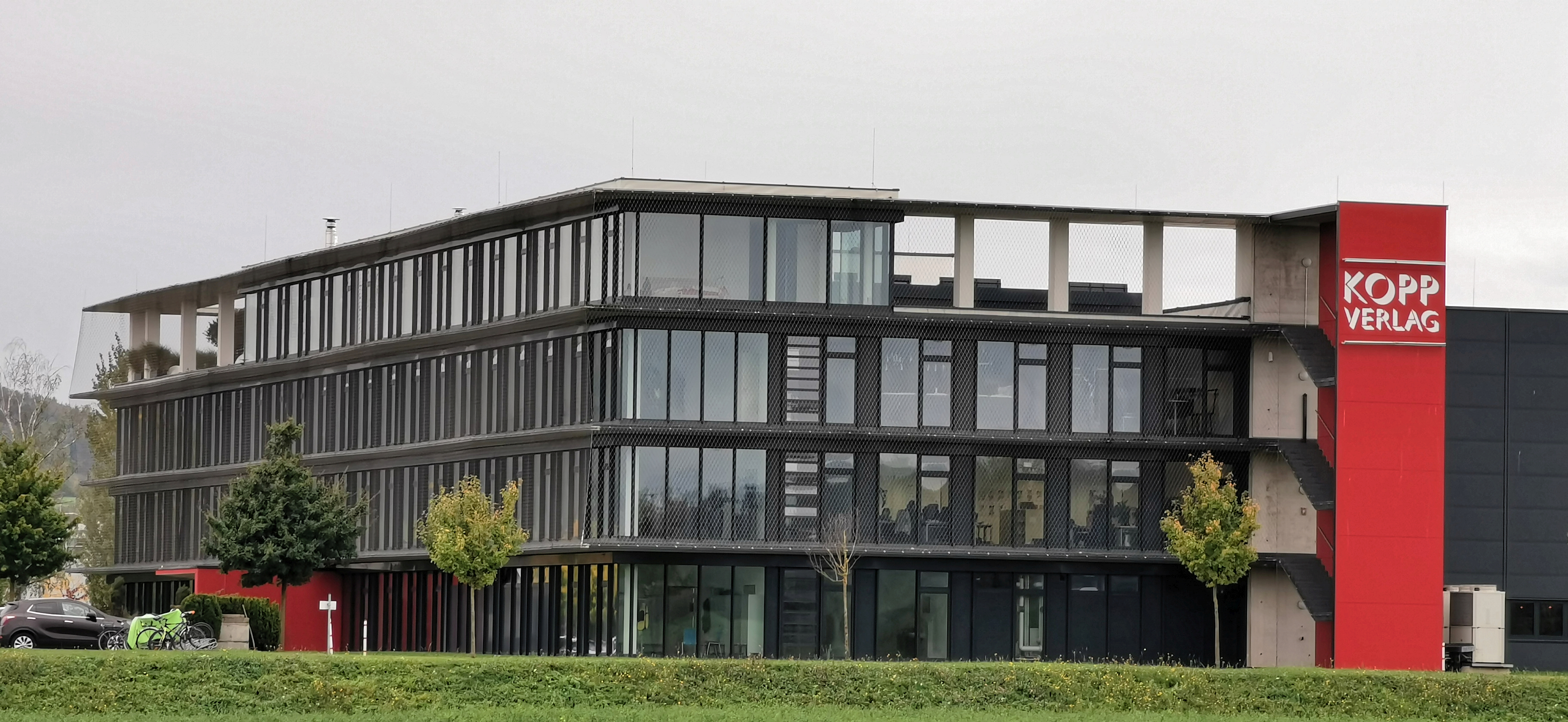 Rottenburg am Neckar 2019